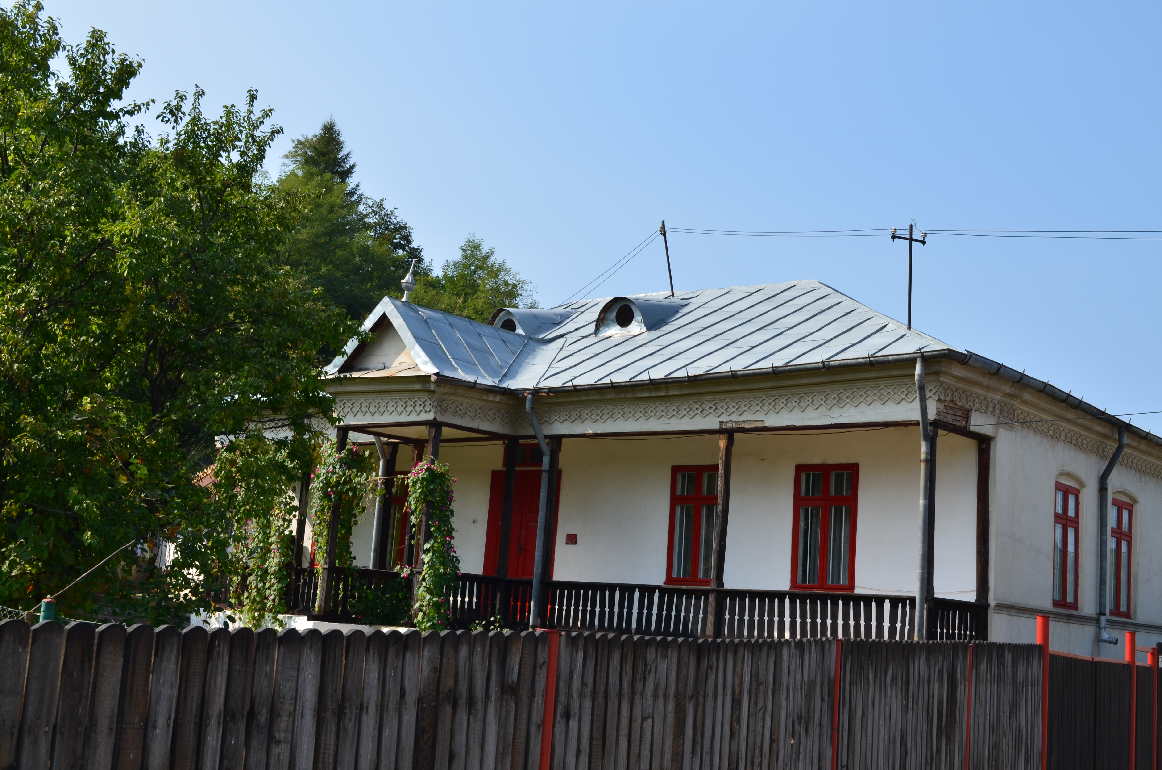 Casa Elisabeta Nestorescu, Vălenii de Munte, Prahova